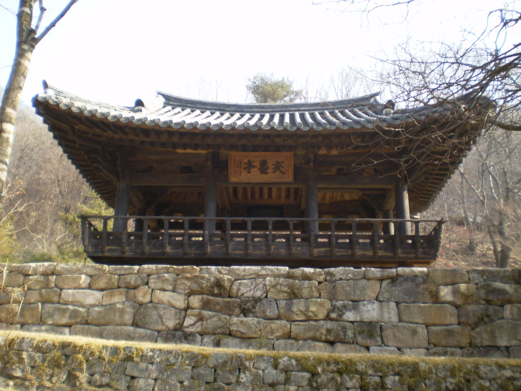 Gyogwijeong pavilion at Mungyeong Saejae.